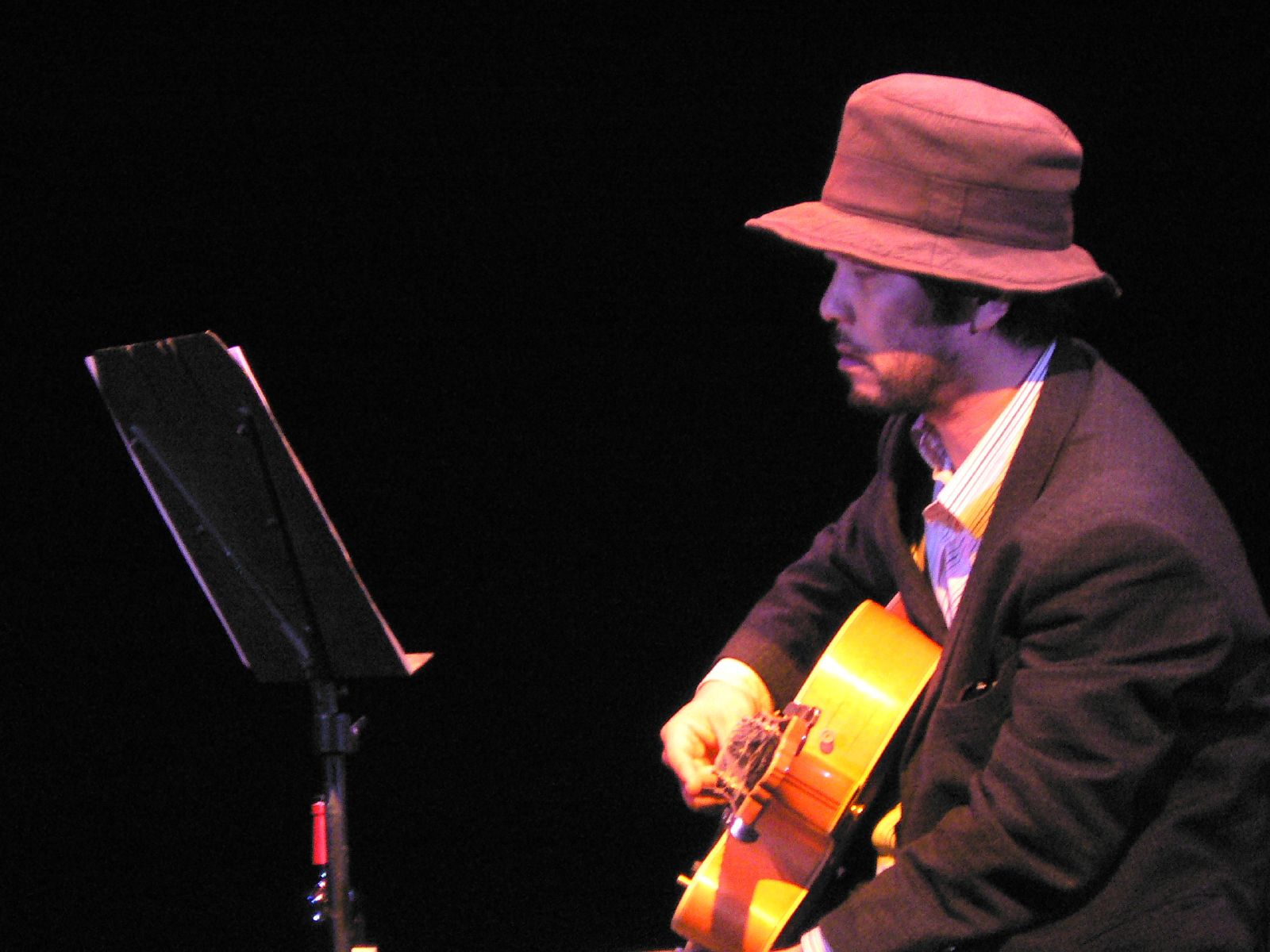 Taku Sugimoto